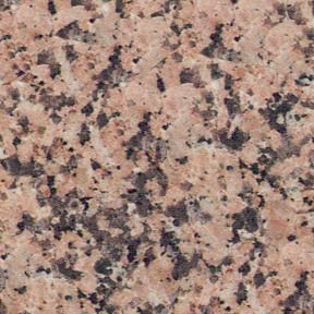 Variedade de granito Rosa Porriño